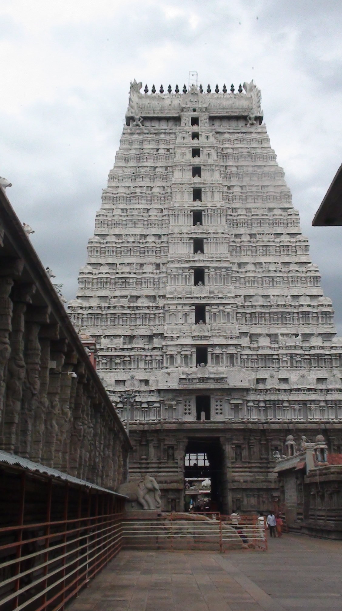 திருவண்ணாமலை தலத்தின் கோபுர தரிசனம்.